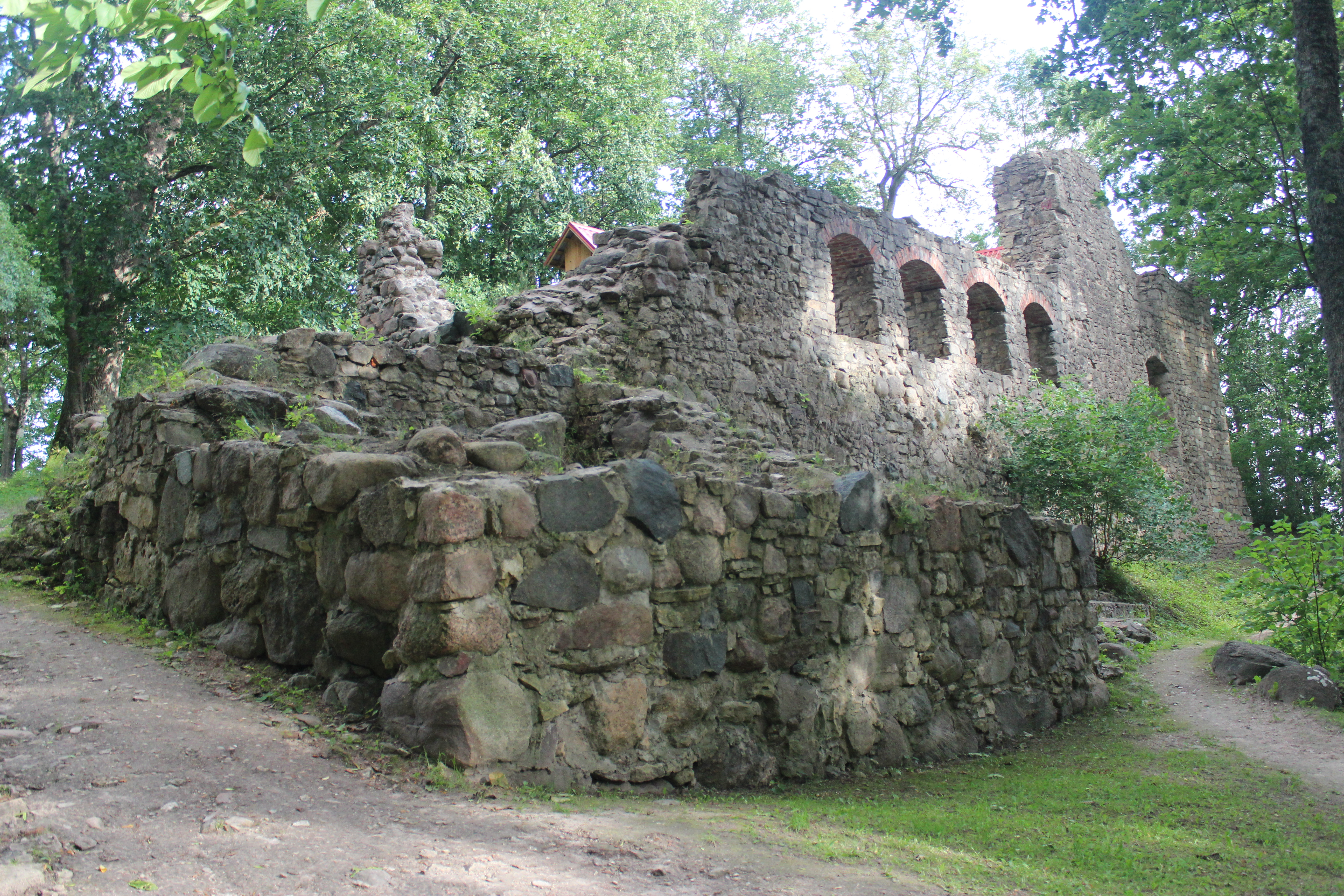 Lielvārdes pilsdrupas, Lielvārde